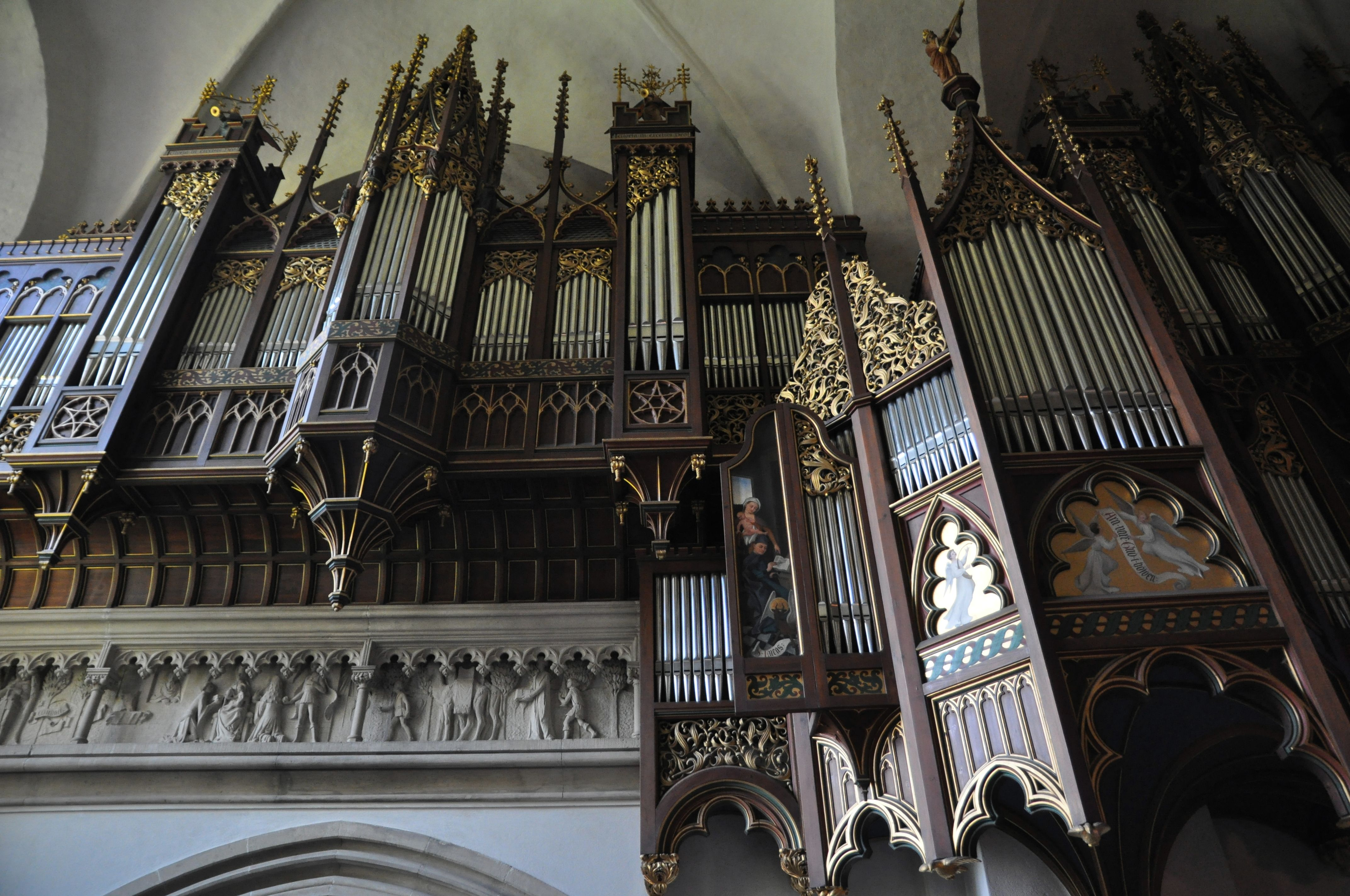 Västerås Domkyrka. Huvudorgeln (läktarorgeln)